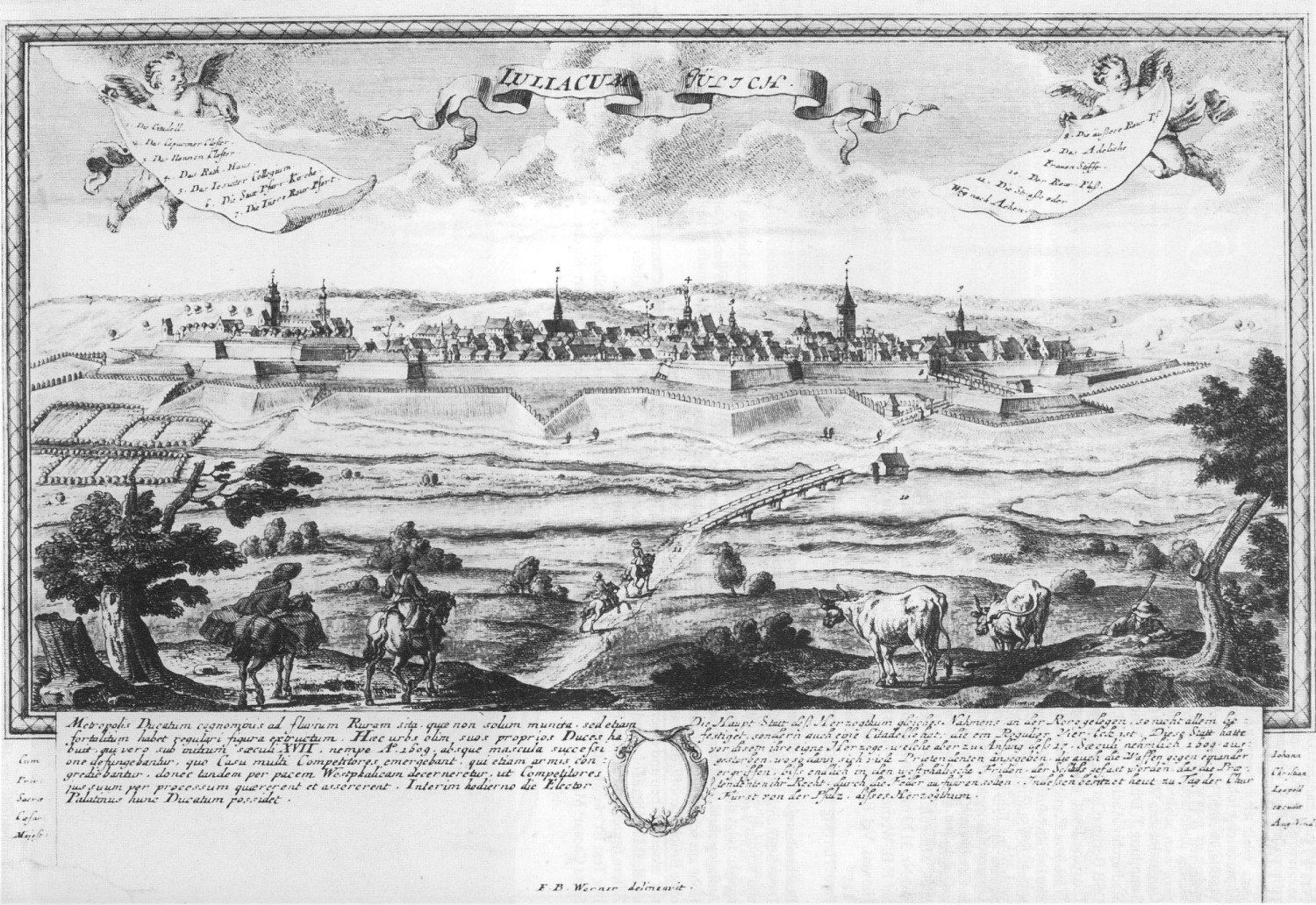 Ansicht Jülichs von Westen um 1750